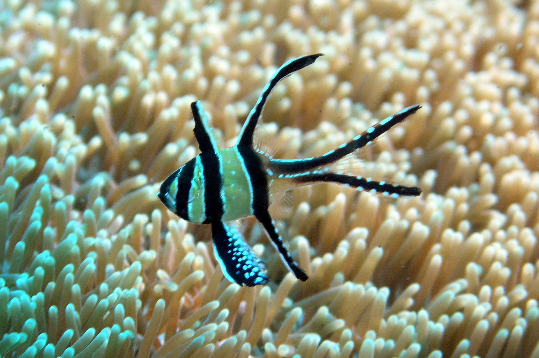 Image of a Banggai cardinalfish. Pterapogon kauderni. Taken at Lembeh Straits, North Sulawesi, Indonesia.